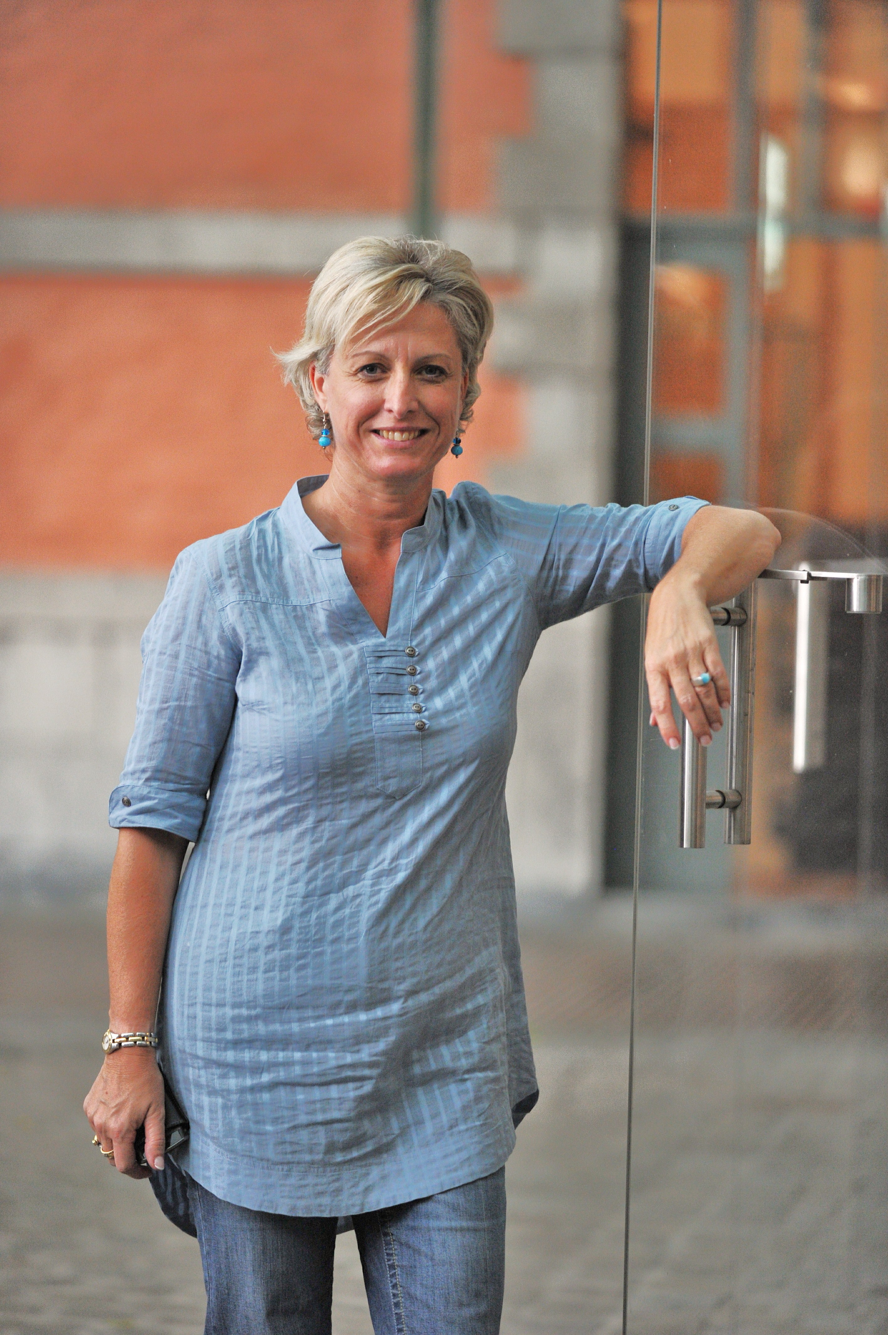 Photo au Parlement